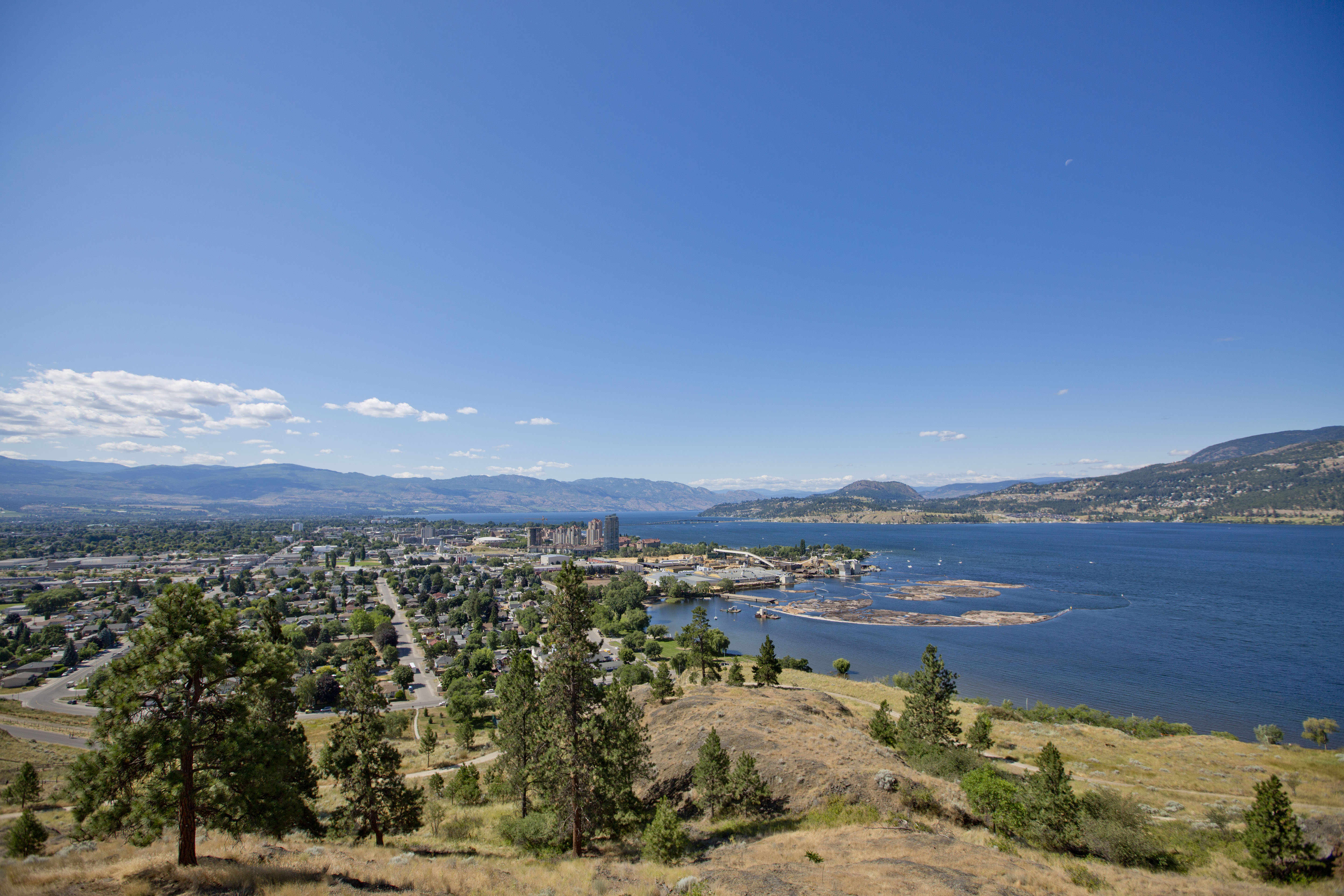 Knox Mountain Park